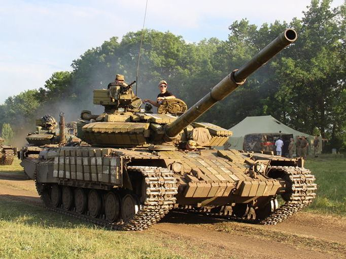 Т-64БВ.